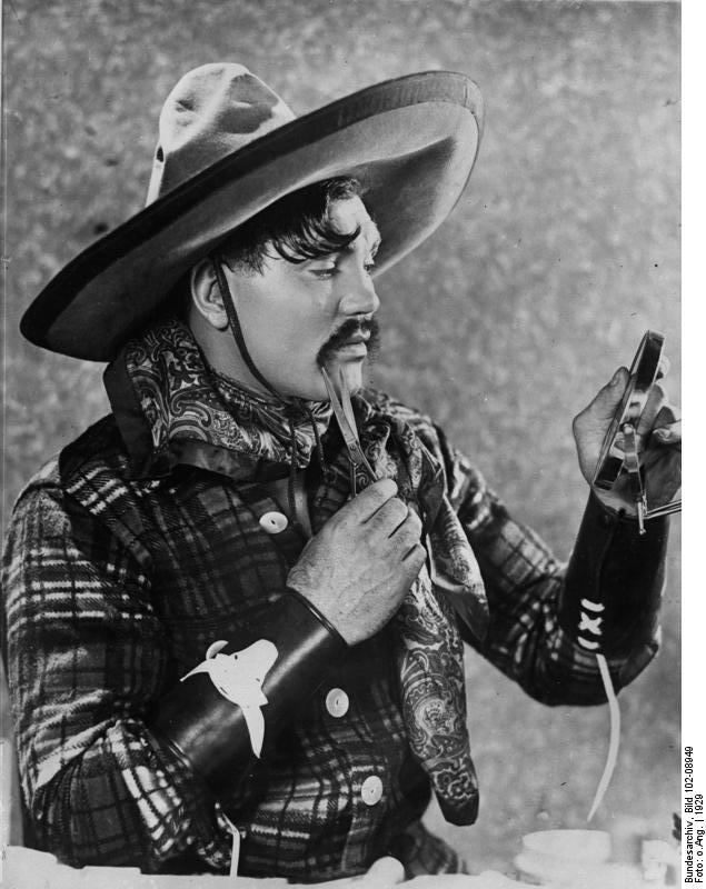 Jack Dempsey, der ehemalige Weltmeister im Boxen als Filmschauspieler! Jack Dempsey, der ehemalige Boxweltmeister ist für eine Tonfilmrolle verpflichtet worden, welche ihn als Mexikaner zeigt. Für diese Szene, welche nur 120 m lang ist und ca. 20 Minuten Spieldauer hat, erhielt der ehemalige Boxweltmeister 100 tausend Dollar.